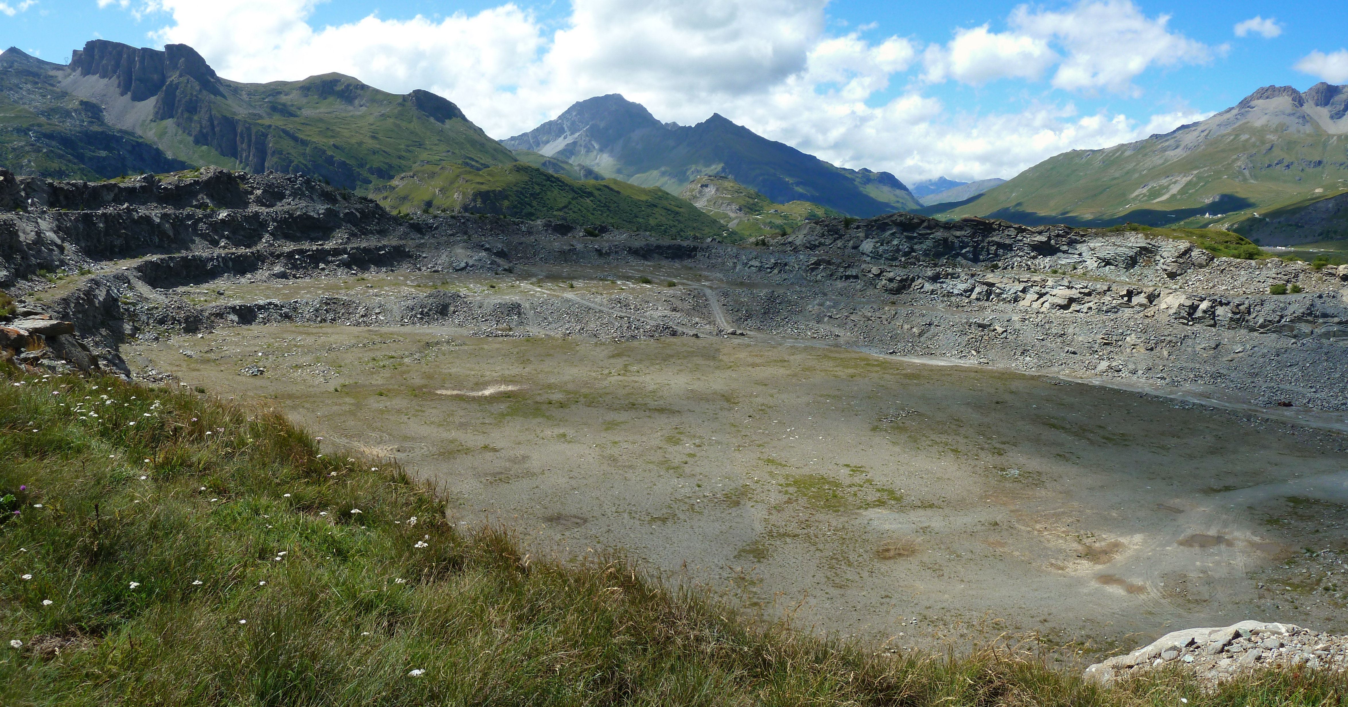 Vista del sito dell'ex Batteria Paradiso